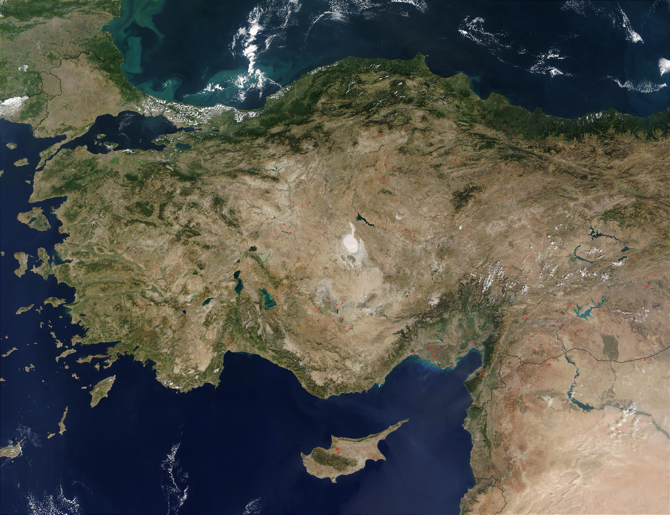 Turkey